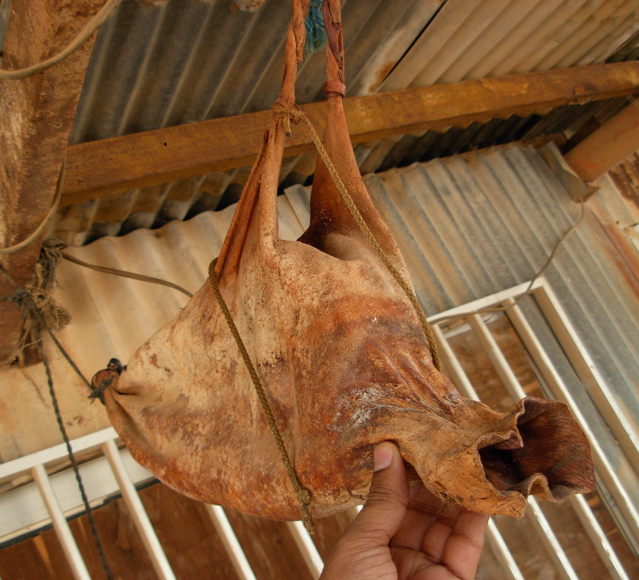 ആടിന്റെ തോലുകൊണ്ട് നിര്‍മ്മിച്ച പാത്രം. മരുഭൂമിയില്‍ വെള്ളം സംഭരിക്കുന്നതിന് ഇത്തരം പാത്രങ്ങള്‍ ഉപയോഗിച്ചിരുന്നു. കുവൈറ്റിലെ ഫയിലക്ക ദ്വീപില്‍ നിന്നും. അകൃതി വരുത്തി ഉണക്കിയെടുക്കാന്‍ പാകത്തില്‍ കെട്ടിത്തൂക്കിയിരിക്കുന്നു.